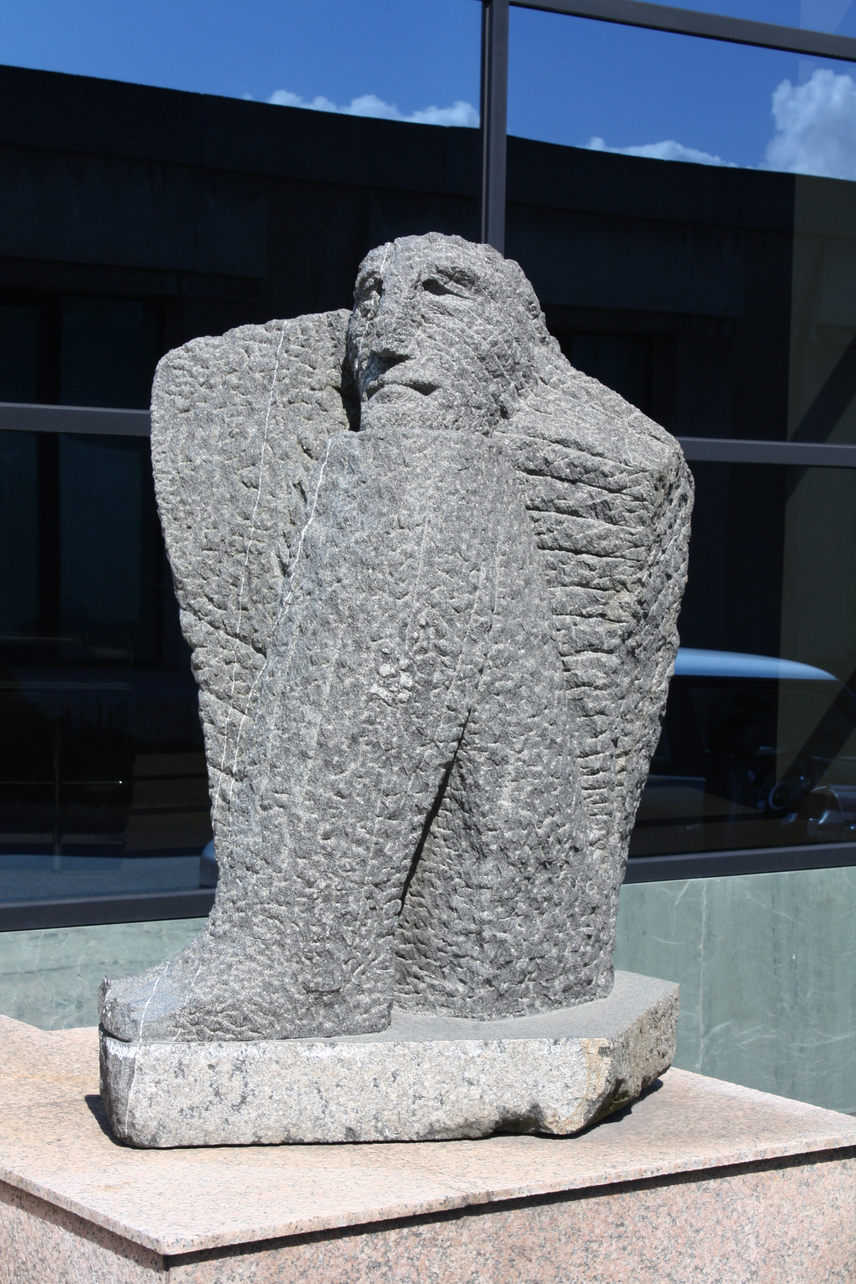 Estatua á entrada do Museo de Arte Contemporáneo Unión Fenosa, na Coruña.